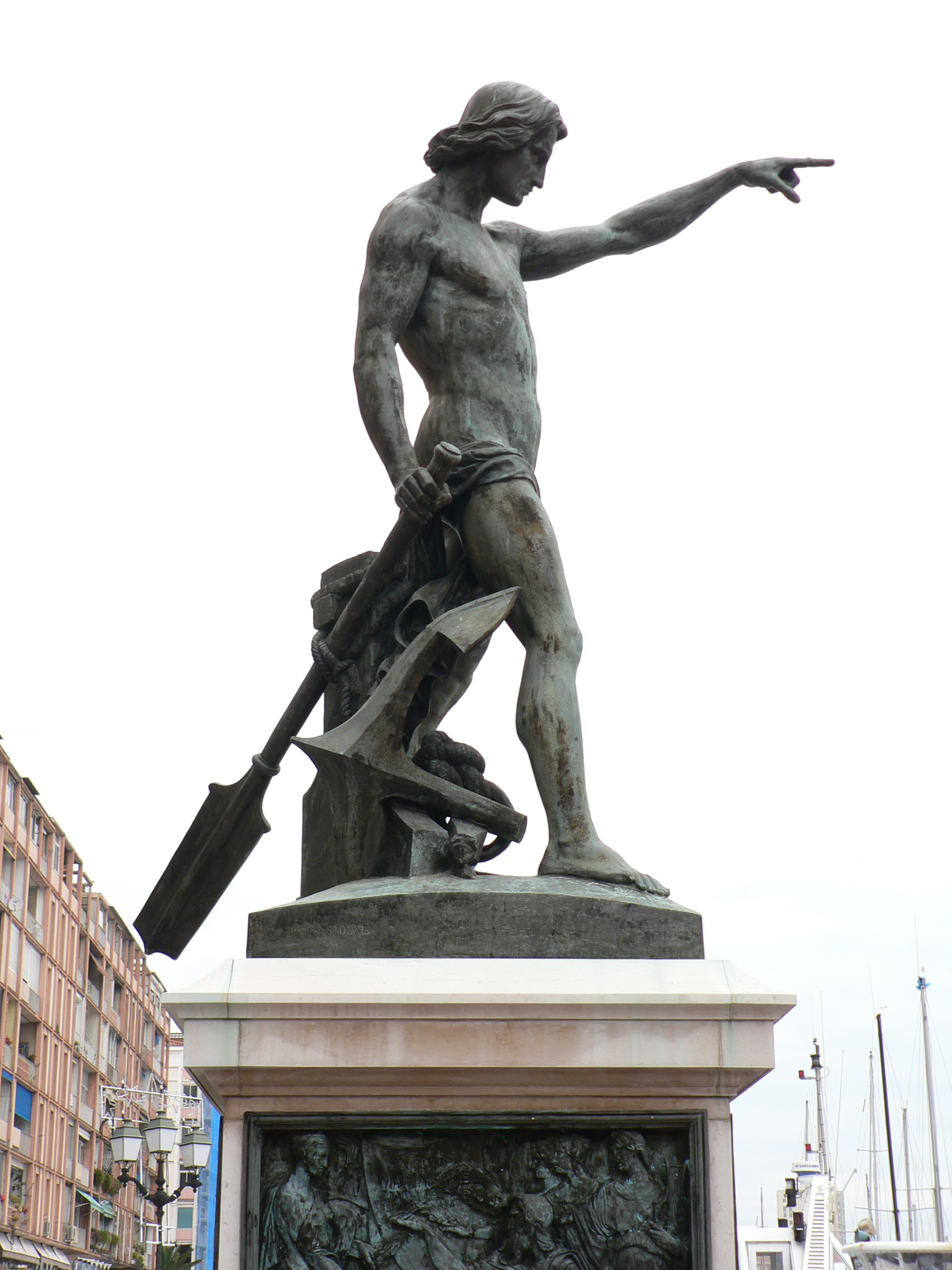 Le Génie de la navigation, mieux connue sous le nom de Cuverville de part l'orientation des fesses de la statue sur le port de Toulon